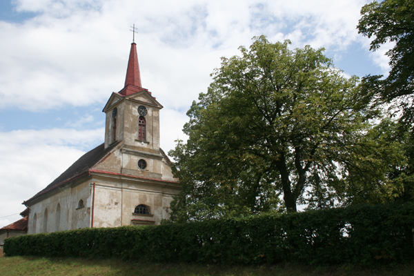 Kostel svatého Mikuláše v Pernarci, okres Plzeň-sever, Česká republika